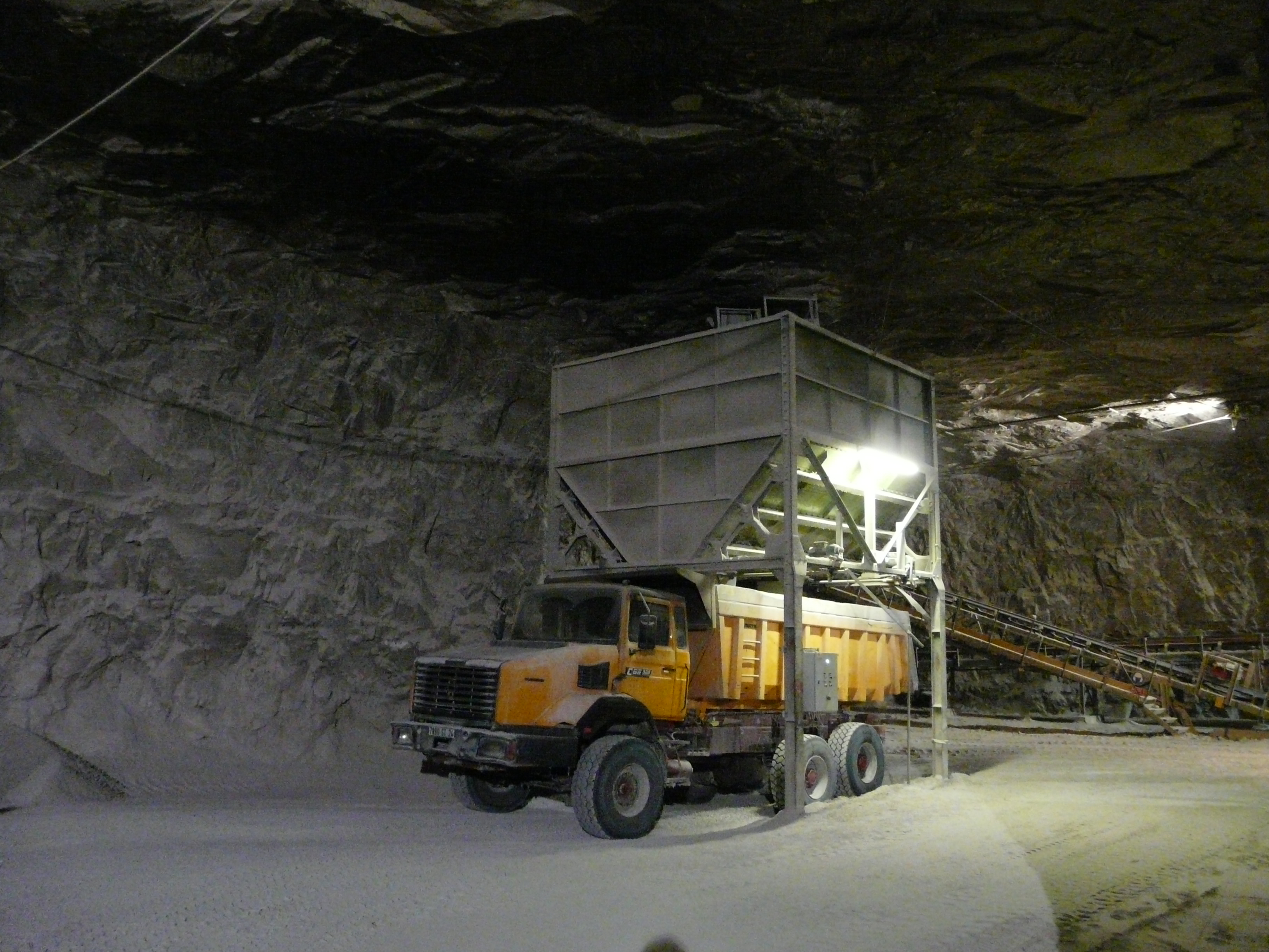 Carrière souterraine de chaux, Saint-Astier, Dordogne, france.